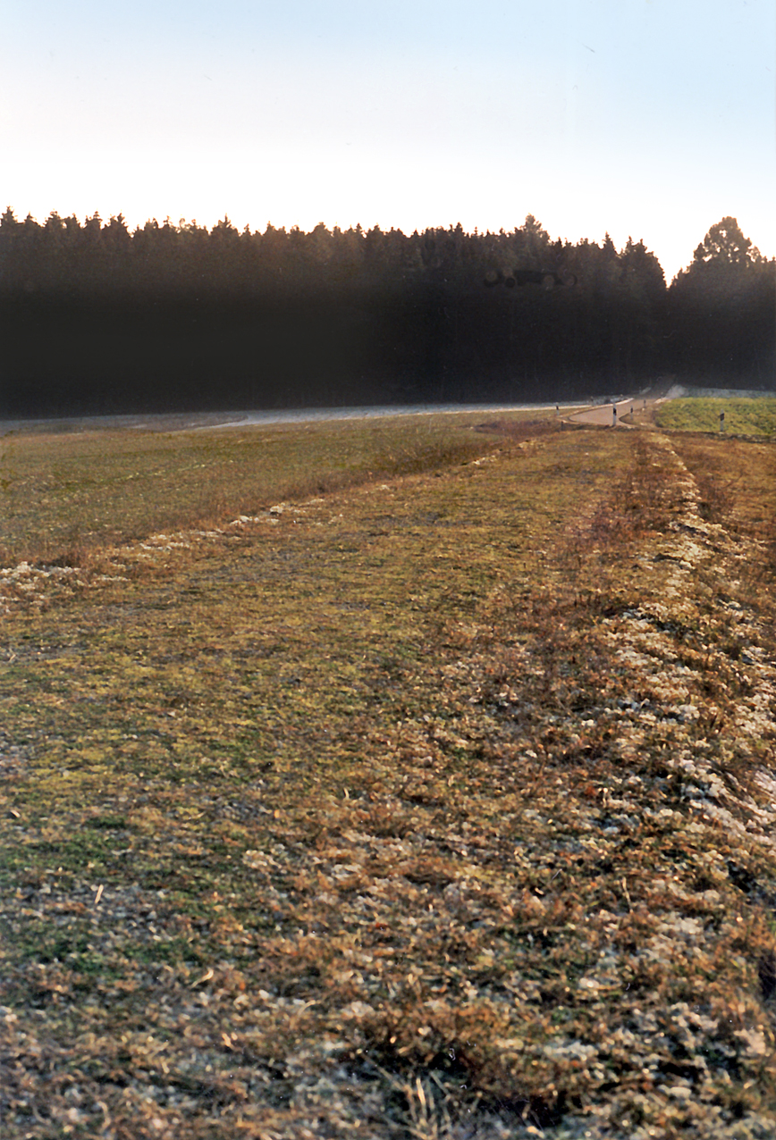 Die aus dem Südtor des Kastell Pfünz führende Straße zur Donau. Links und rechts des deutlich sichtbaren Straßendamms wurden die Überreste des Lagerdorfes entdeckt, das ungefähr bis zum Waldrand reichte. Zustand im Januar 1993.